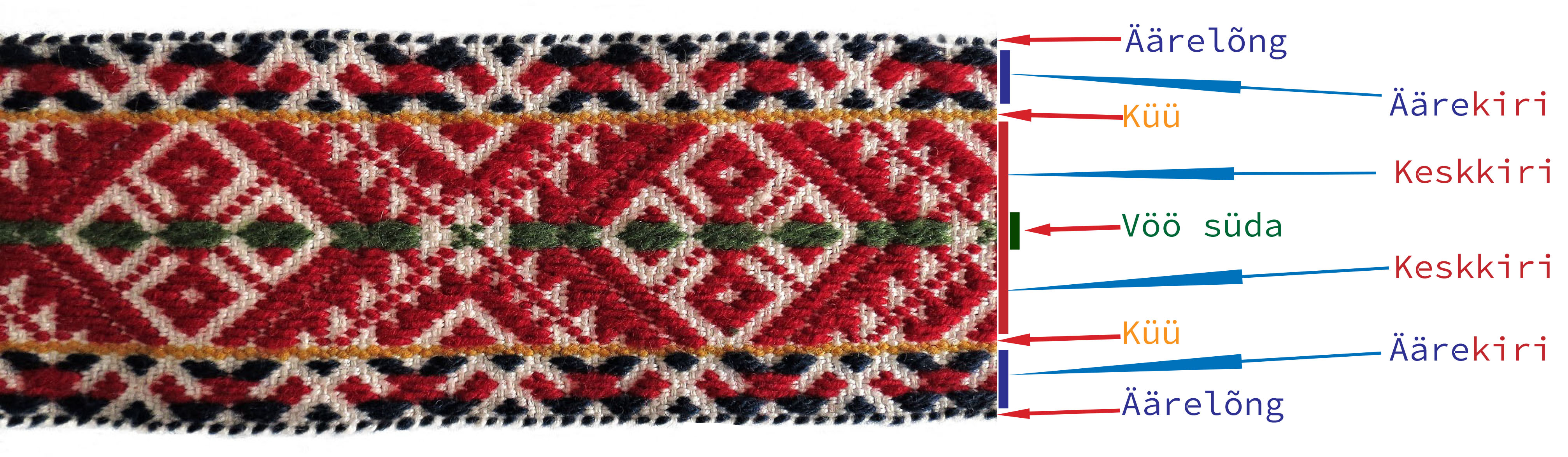 Kirivöö mustriosade nimetused ja asukohad.